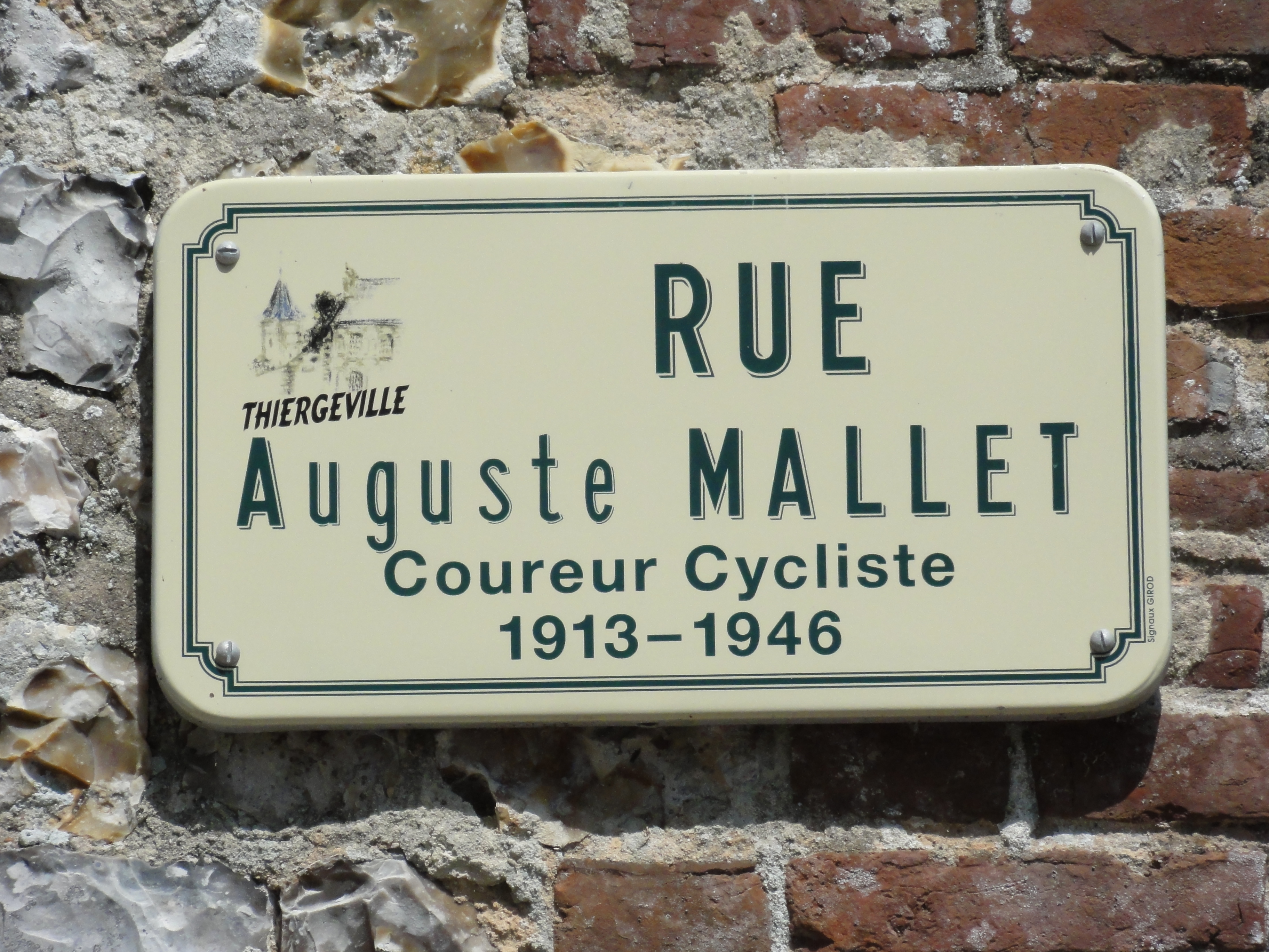 Thiergeville (Seine-Mar.) rue Auguste Mallet coureur cycliste